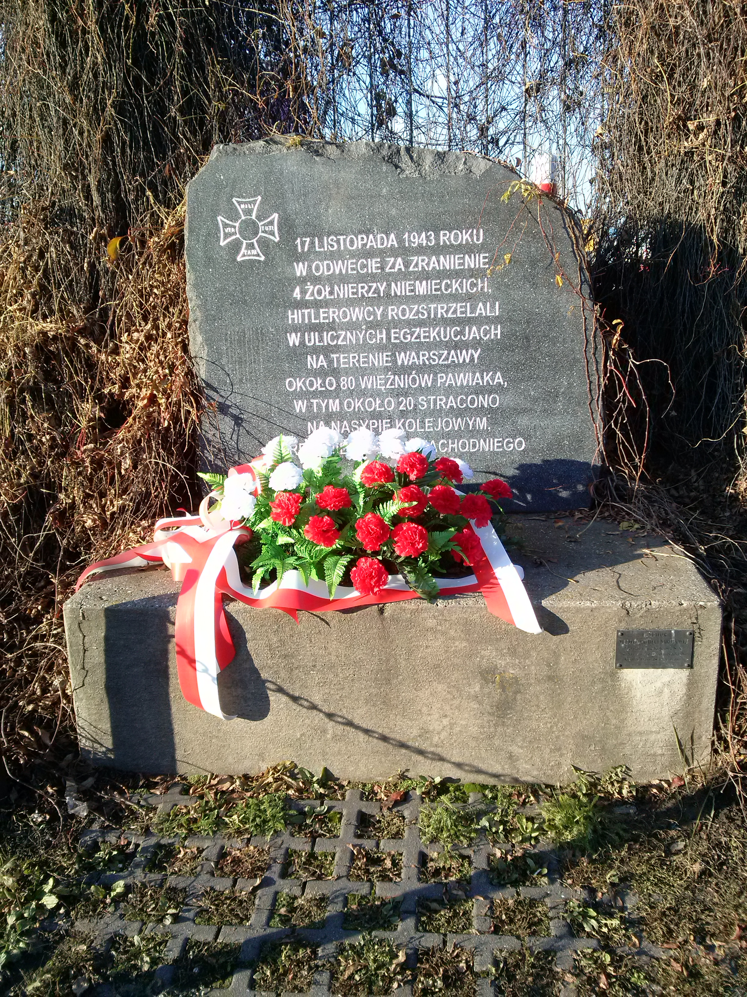 Tablica upamiętniająca hitlerowskie egzekucje z 17.XI.1943 stojąca tuz obok wyjścia z tunelu prowadzącego do stacji Warszawa Zachodnia